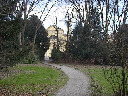 Parco di Villa Ghirlanda